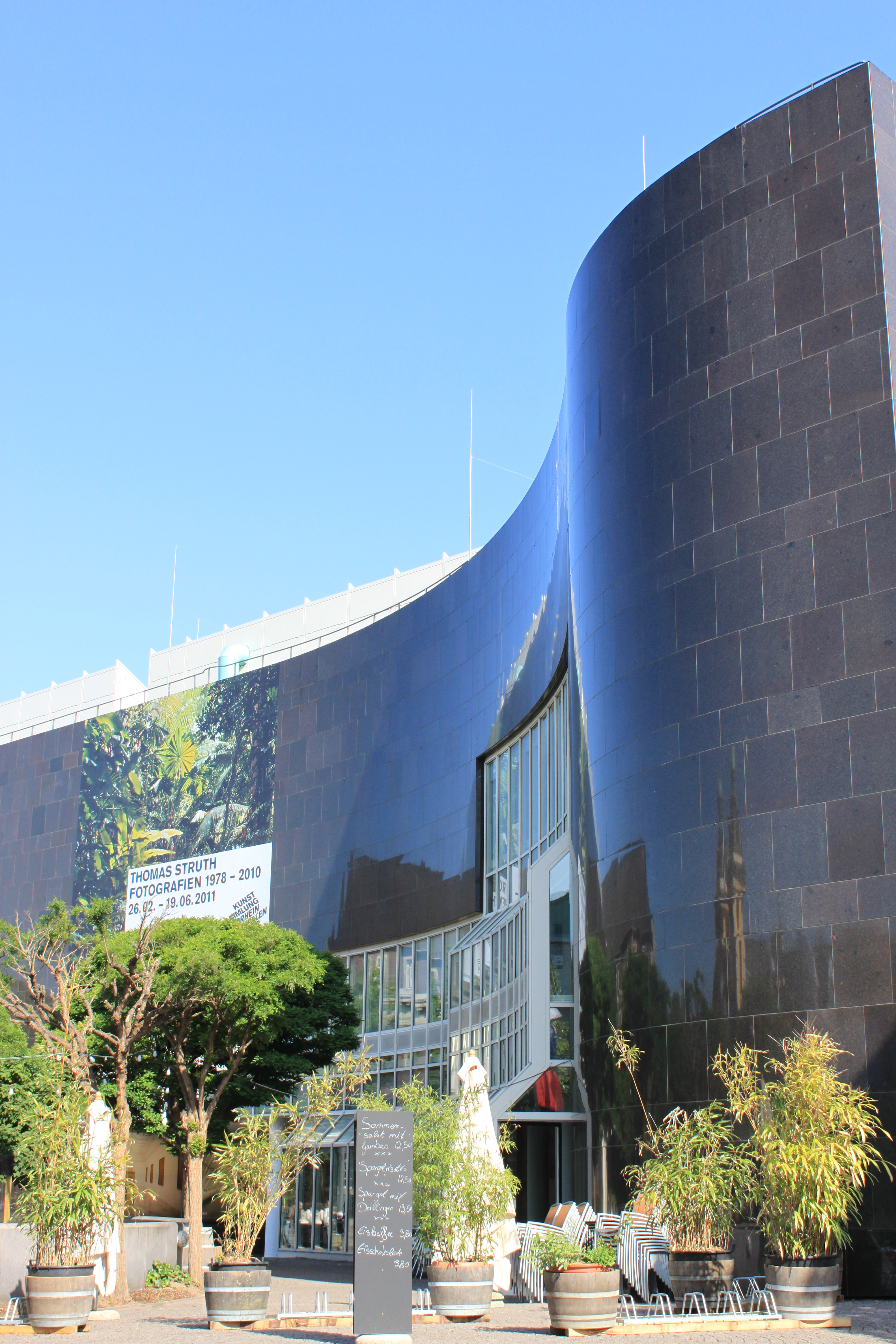 K20 Außenansicht